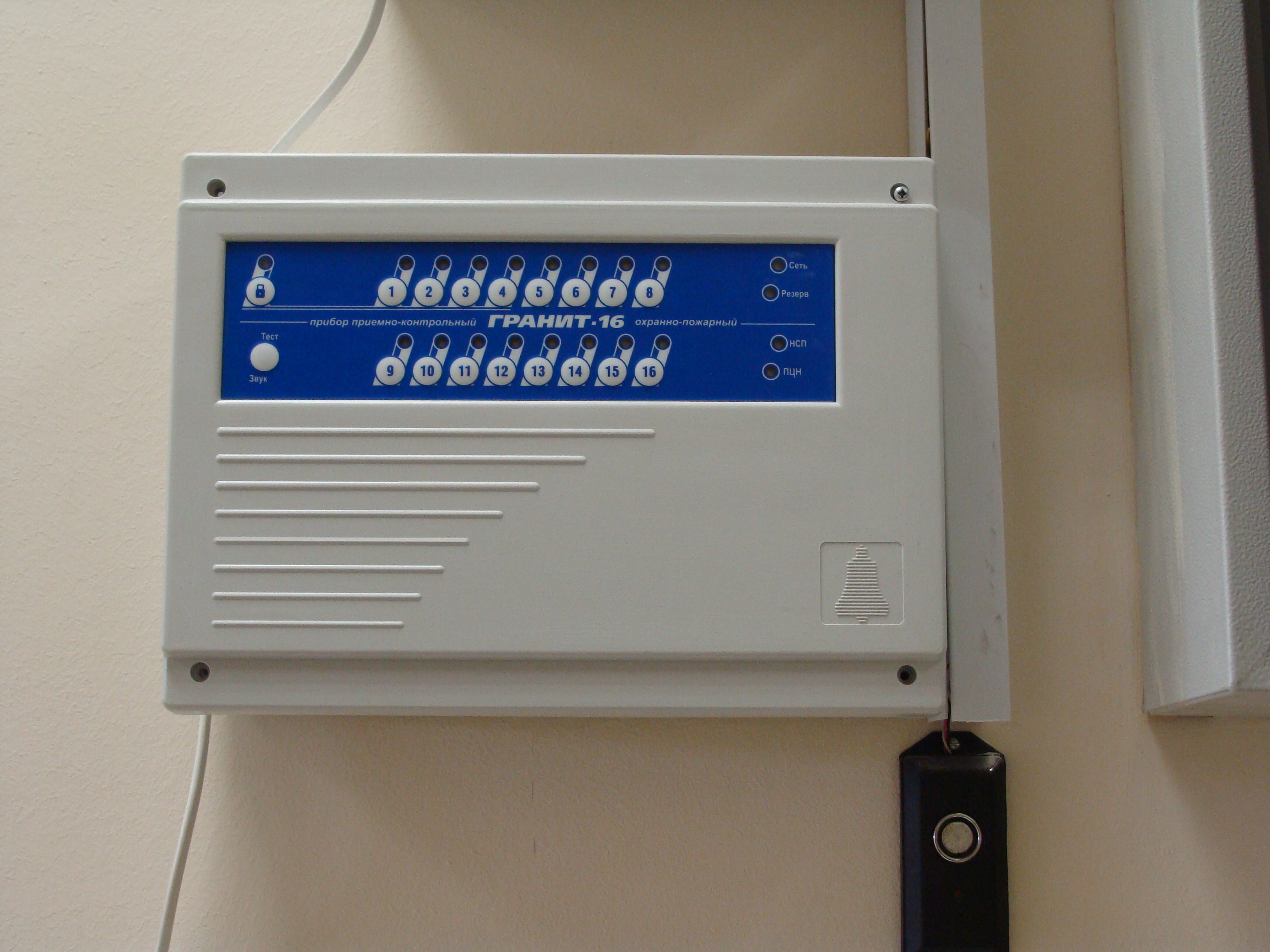 Прибор приемно-контрольный охранно-пожарный Гранит-16